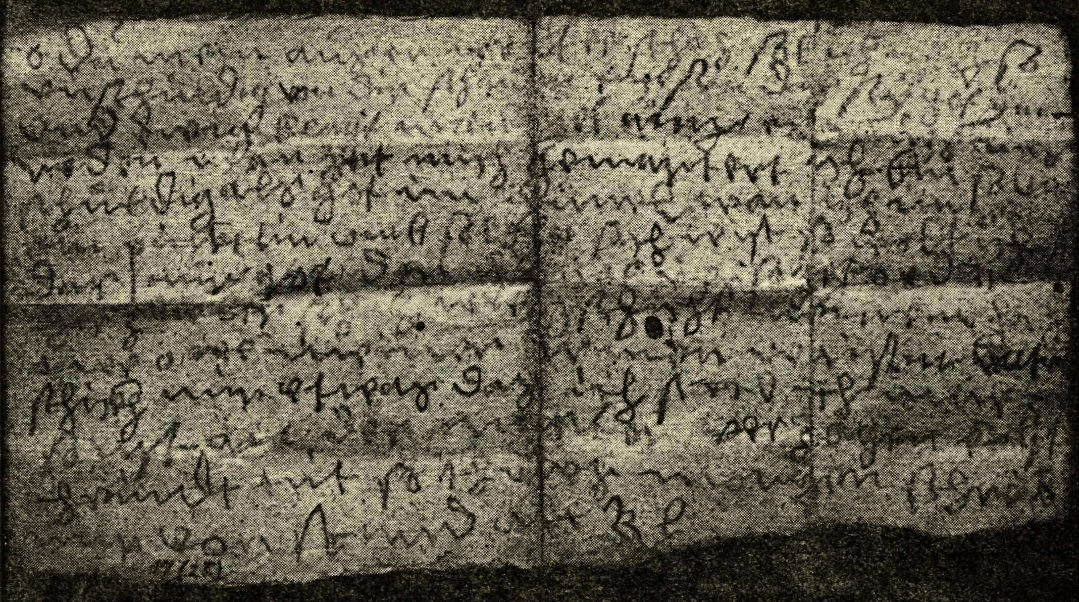 Dokument im Hexenprozess gegen Rebekka Lemp 1590 in Nördlingen. Brief (Vorderseite) von Rebekka Lemp an ihren Ehemann Peter Lemp vom 2. August 1590.